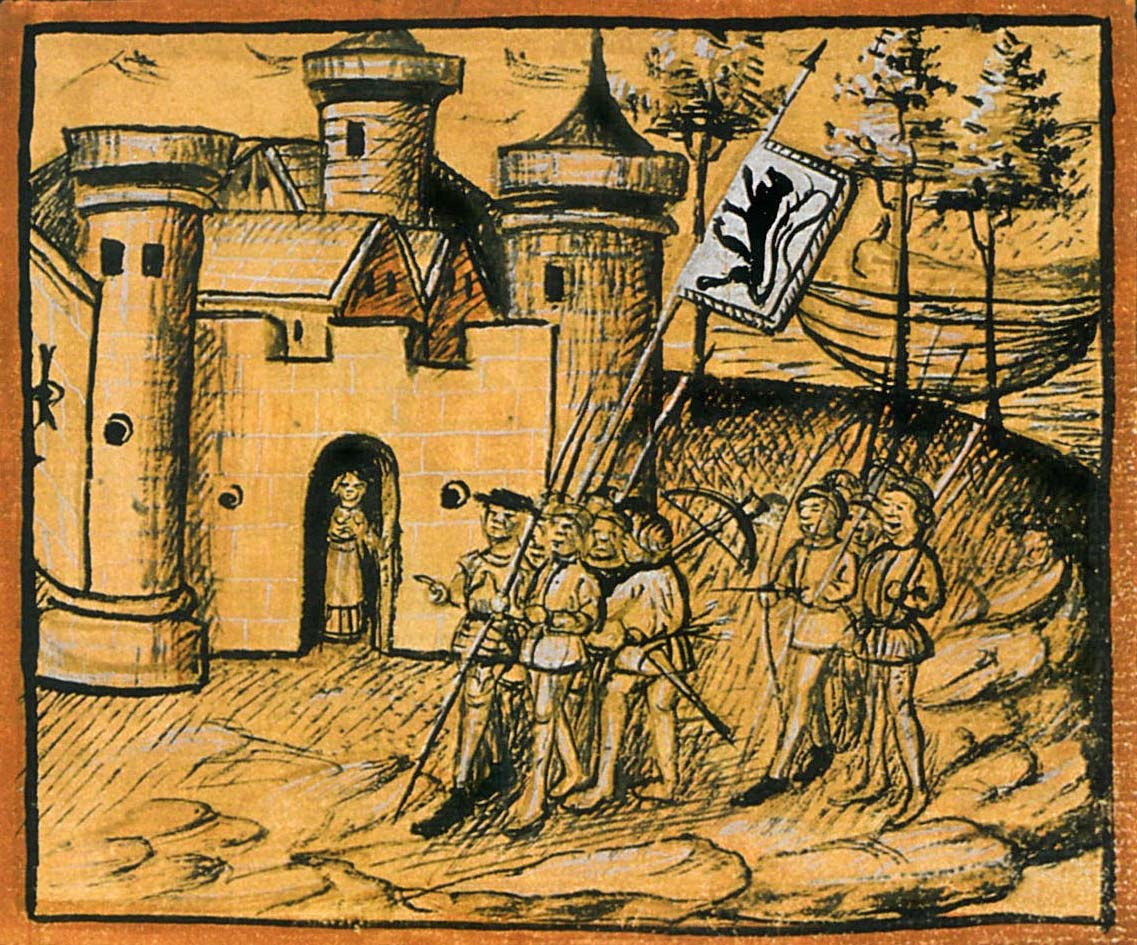 Abbildung zu Beginn des 12. Kapitels des Le Canarien Version B